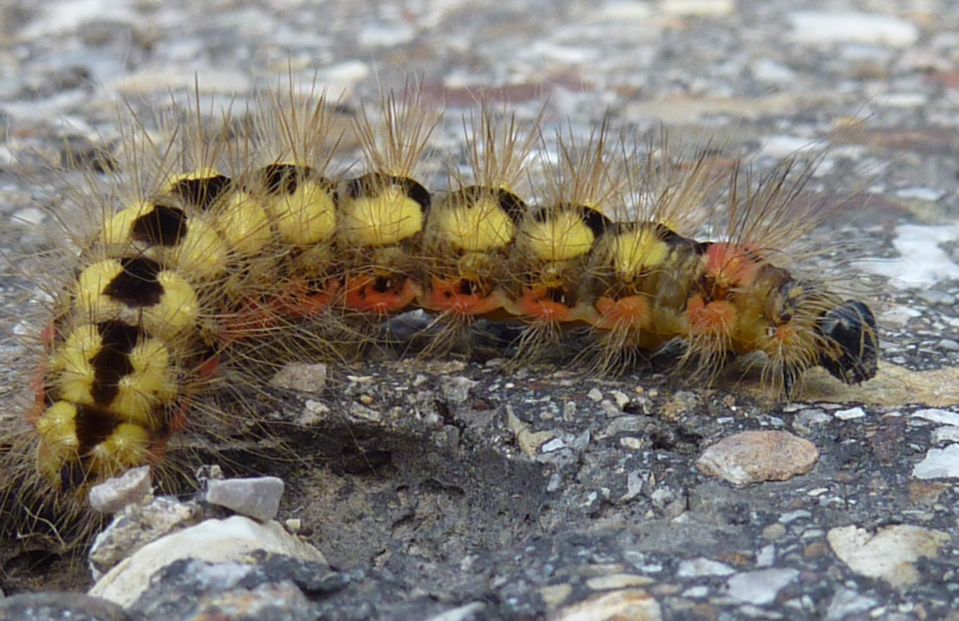 Raupe von Acronicta euphorbiae, fotografiert in Oberjoch